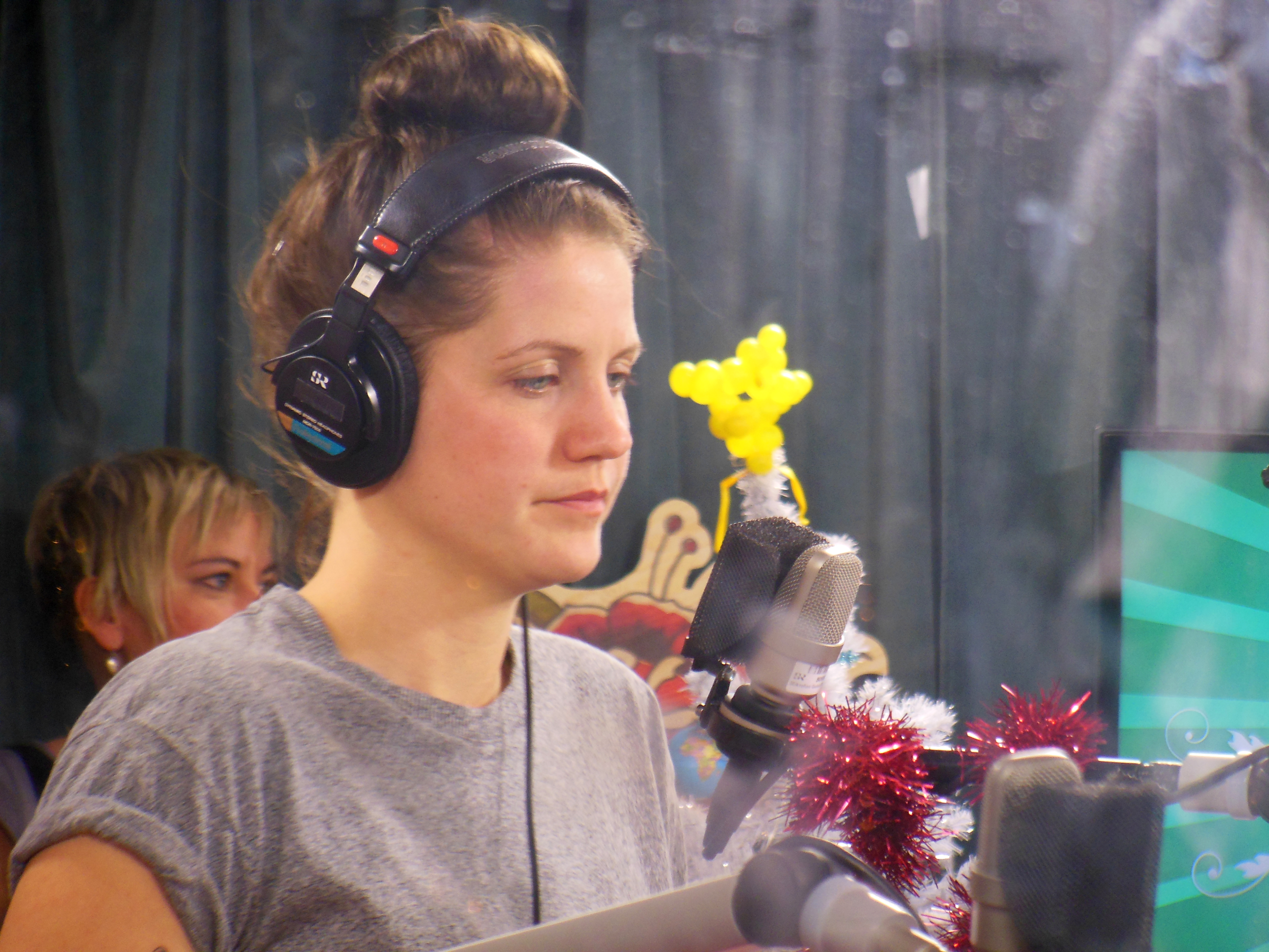 Emma Knyckare i glasburen under Musikhjälpen 2013.